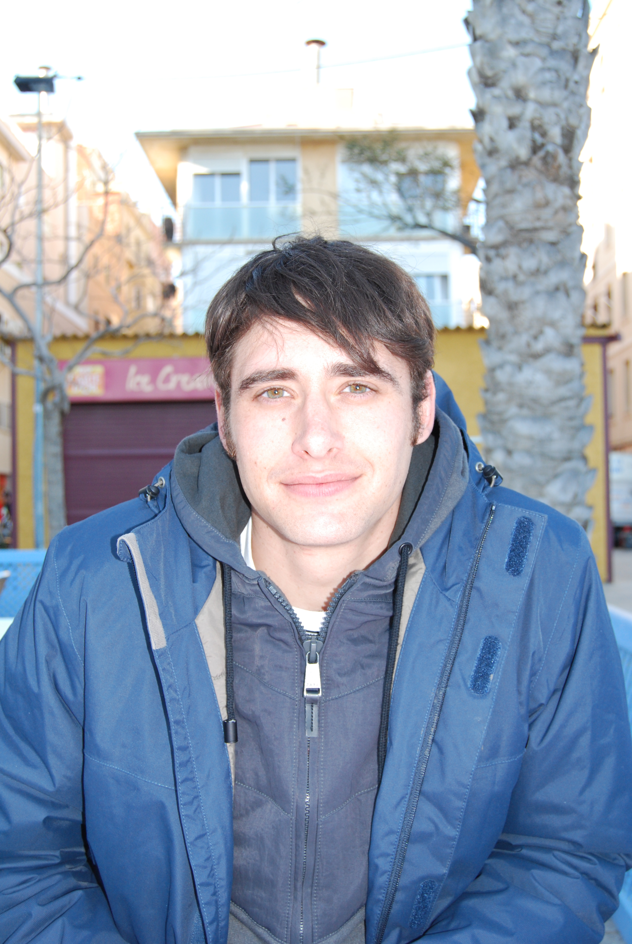 Llorenç González durante el rodaje de El sexo de los ángeles